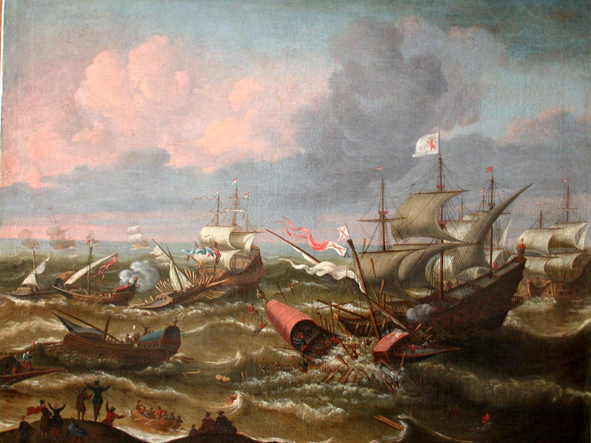 Halve Maene overvaart een galei op 3 oktober 1602. Ook wel gezien als een afbeelding van de Slag bij Sluis van 26 mei 1603